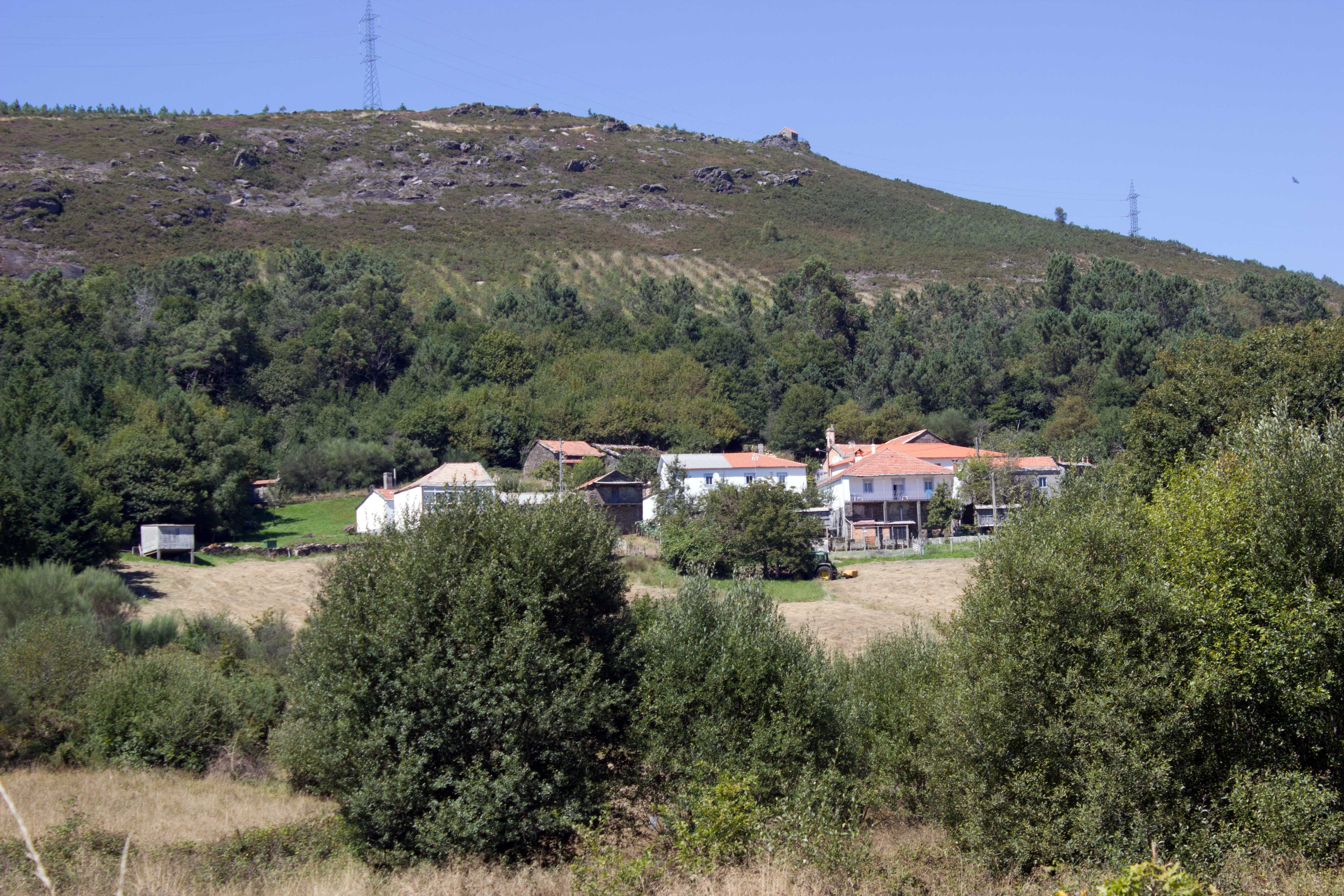 Lugar de Ameixeiras, no concello de Forcarei.